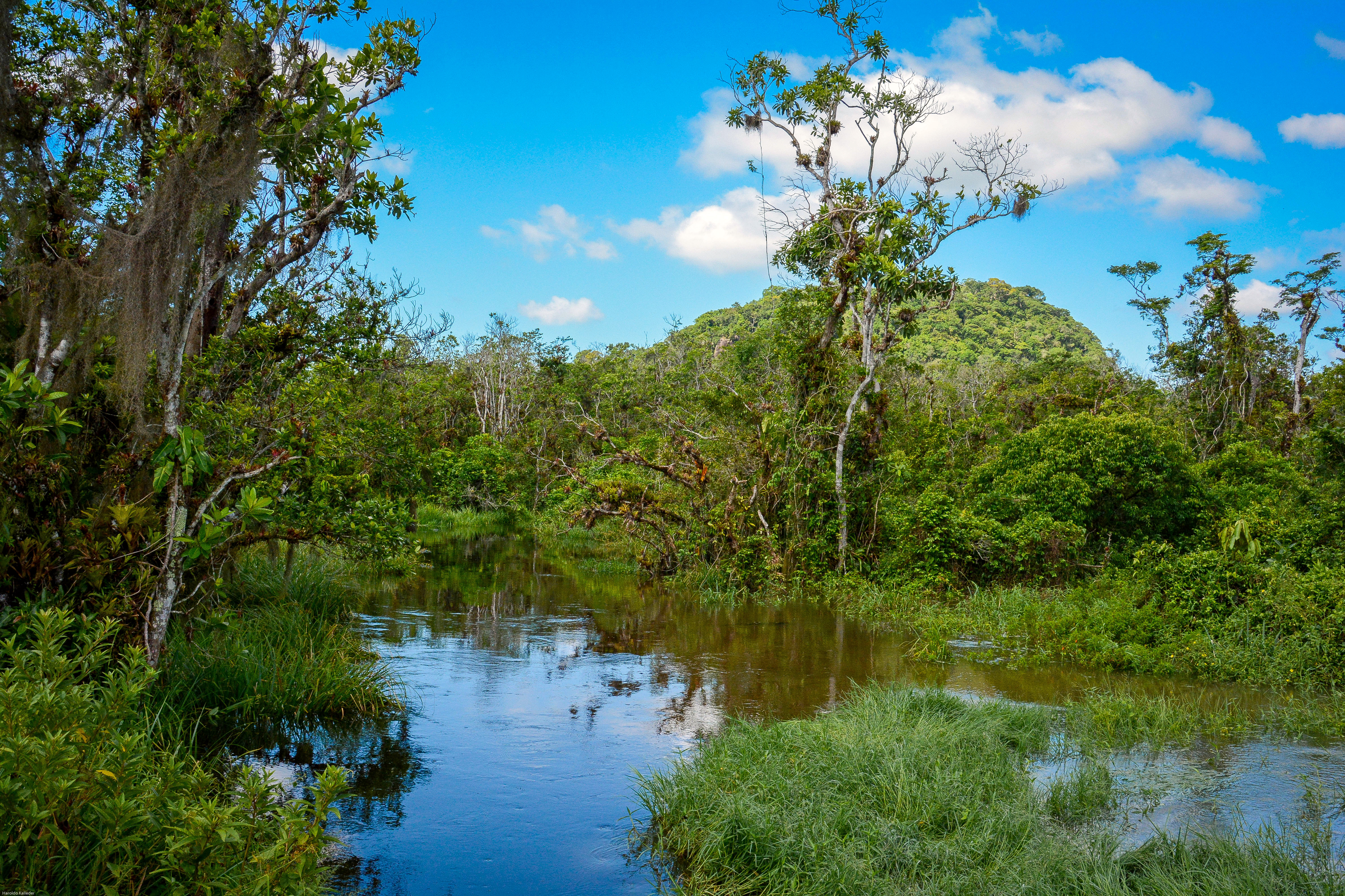 Contando com 9.312 Hectares, o Parque Estadual Restinga de Bertioga – PERB - foi criado em 09 de dezembro de 2010 pela Fundação Florestal. É uma Unidade de Conservação de Proteção Integral totalmente inserida no território do Município de Bertioga/SP, que tem por objetivo conservar o ecossistema associado à Mata Atlântica no Estado de São Paulo. Aberto à visitação pública monitorada, o Parque conta com diversos rios e trilhas, dentre estas, a Trilha D’Água e a Trilha do Guaratuba.